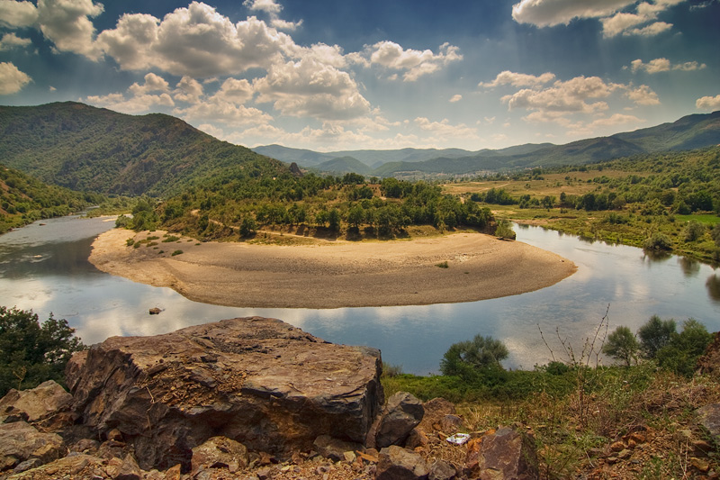 Arda Meanders